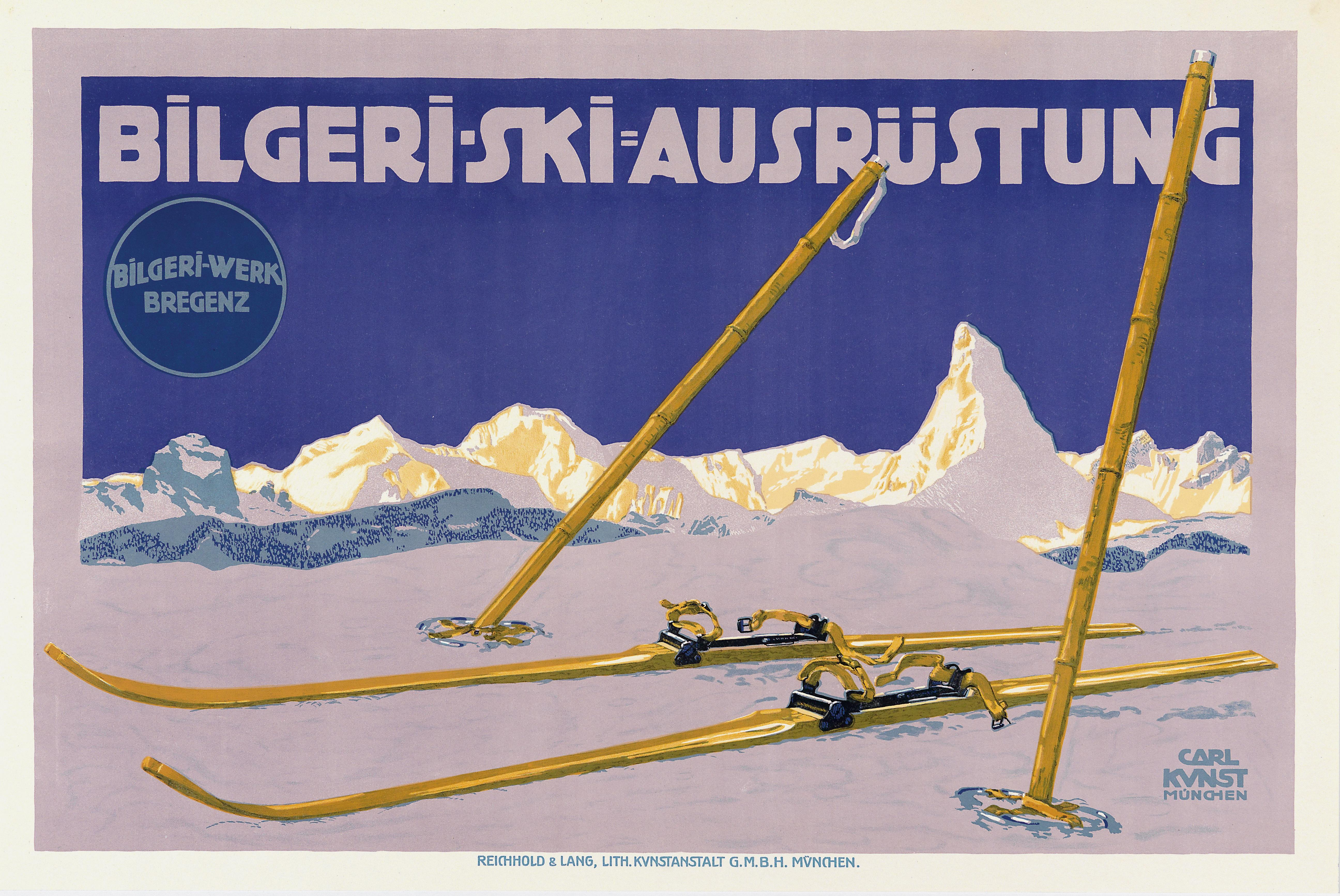 "Bilgeri-Ski-Ausrüstung", Bilgeri-Werke Bregenz; Herstellung: Deutschland, um 1910, 76 x 51 cm, Druck: Reichhold & Lang, München